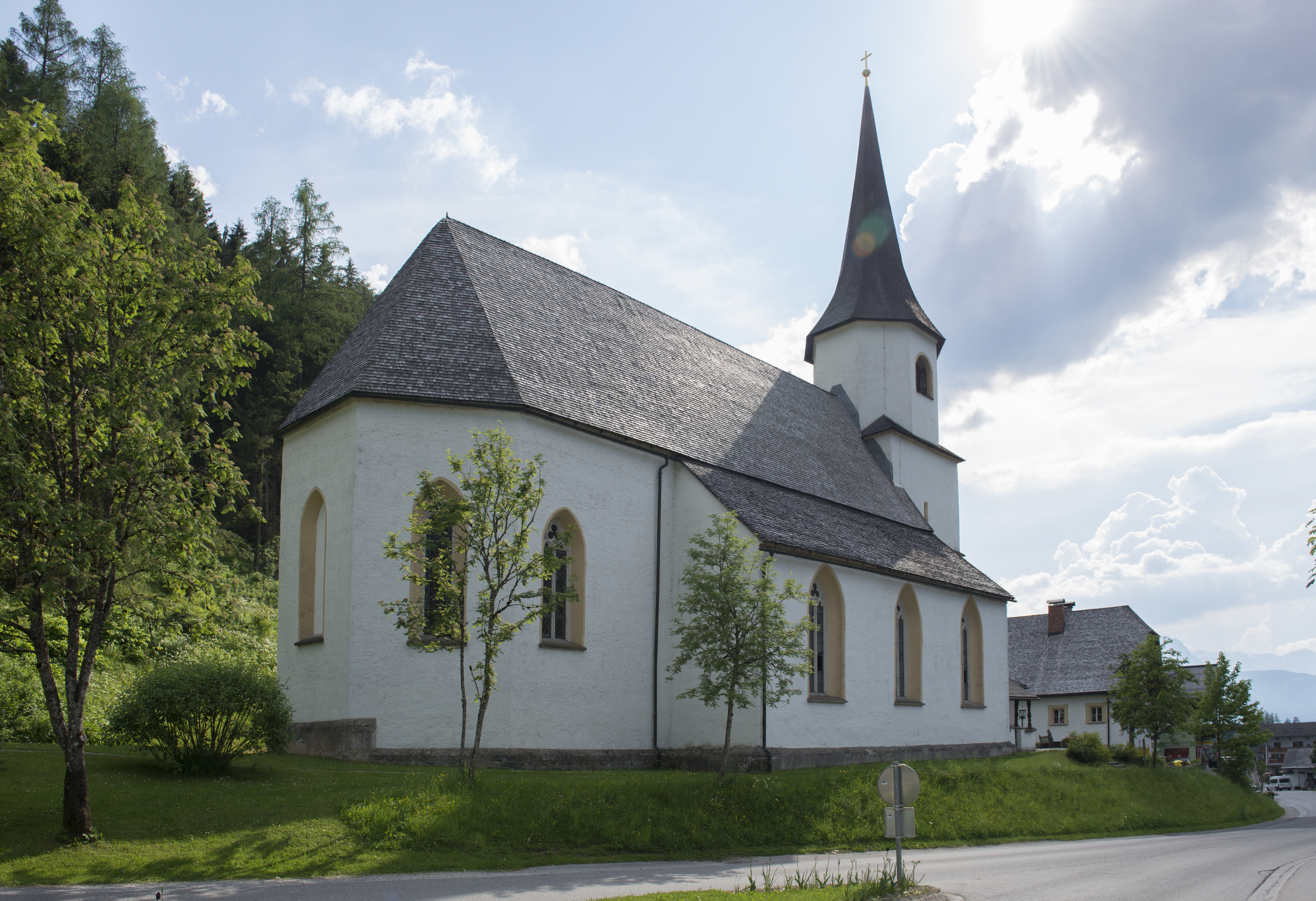 Kath. Pfarrkirche, Mariae Geburt